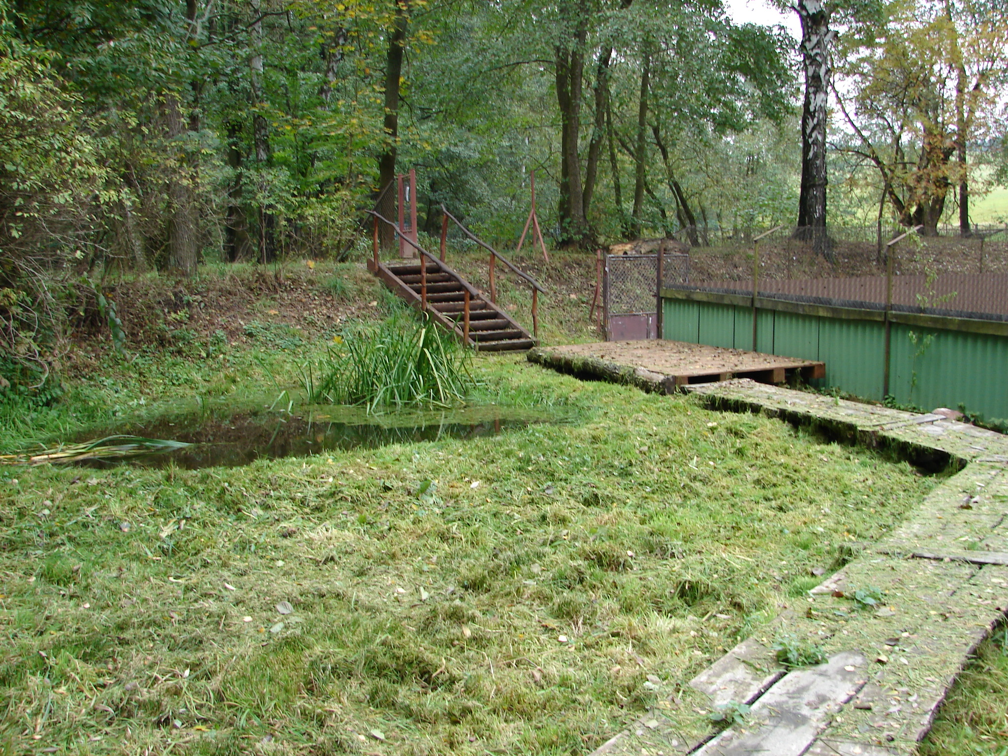 Zvířata v záchranné stanici Pavlov (v okrese Havlíčkův Brod).